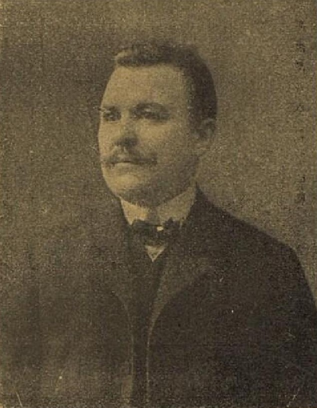 Karel Folber, český a československý politik a senátor